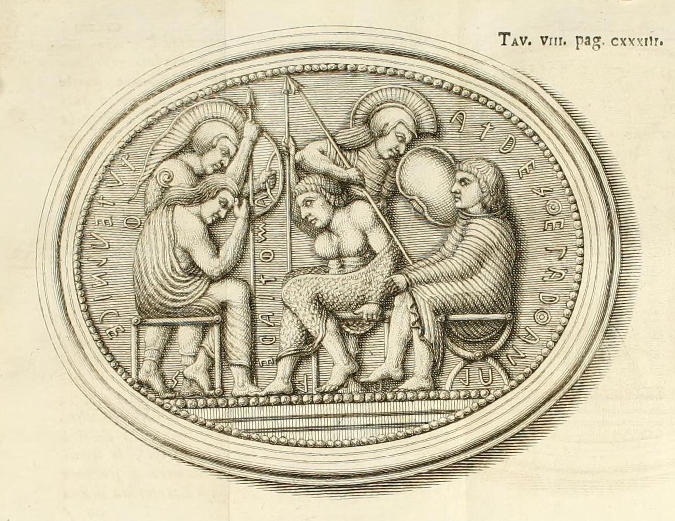 Antonio Francesco Gori: Storia antiquaria etrusca. Firenze 1749. Tav. VIII pag. 133: Scarabeo etrusco (Stosch’scher Stein)